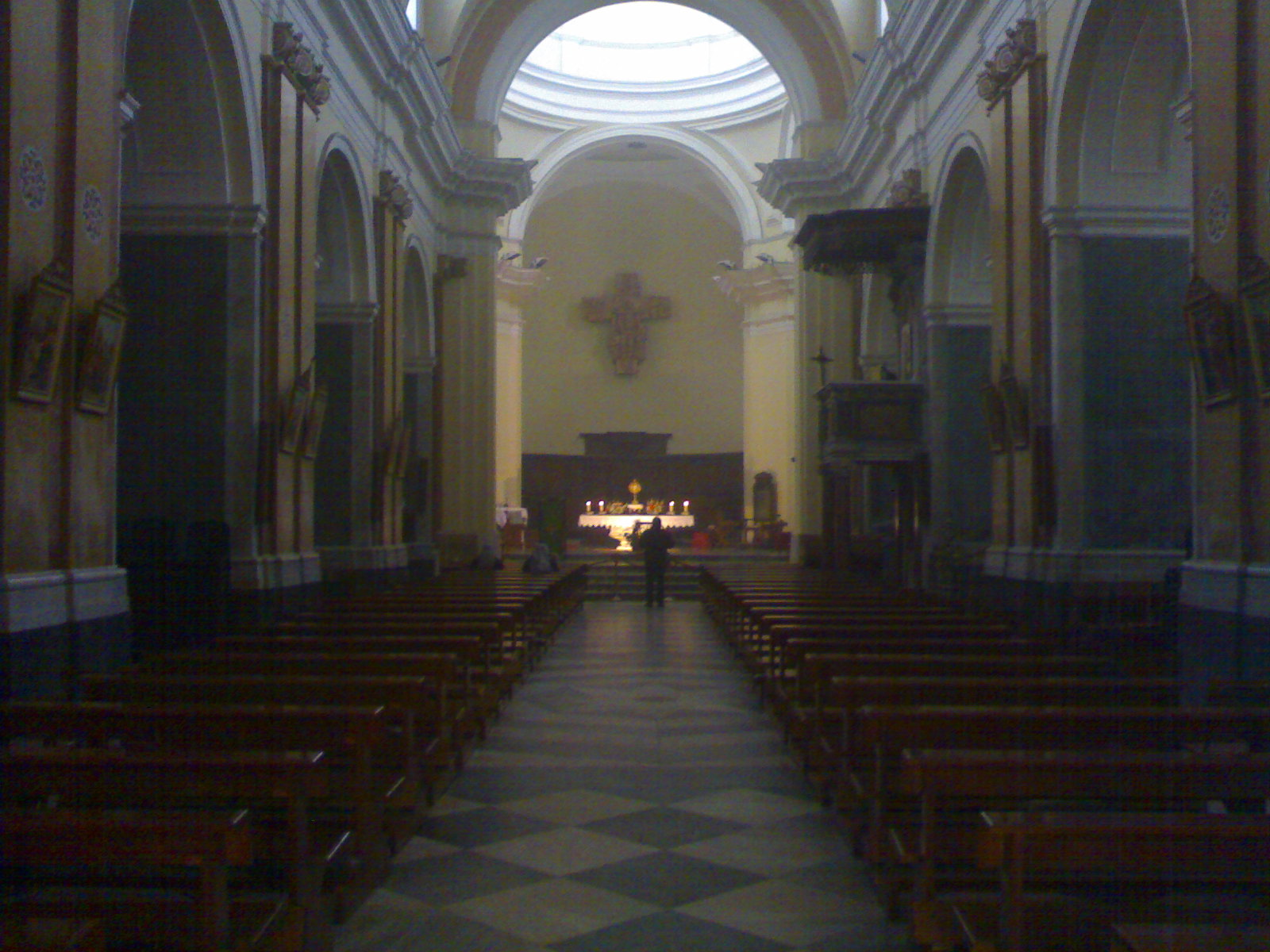 Altra veduta del Duomo di Crotone